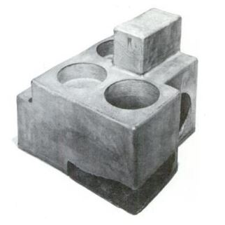 این قطعه بریلیمی را که به دلیل پیچیدگی در هندسه نمی توان با روش فورج تولید کرد، از پرس ایزواستاتیک گرم یا همان هیپ برای شکل دهی آن استفاده شده است